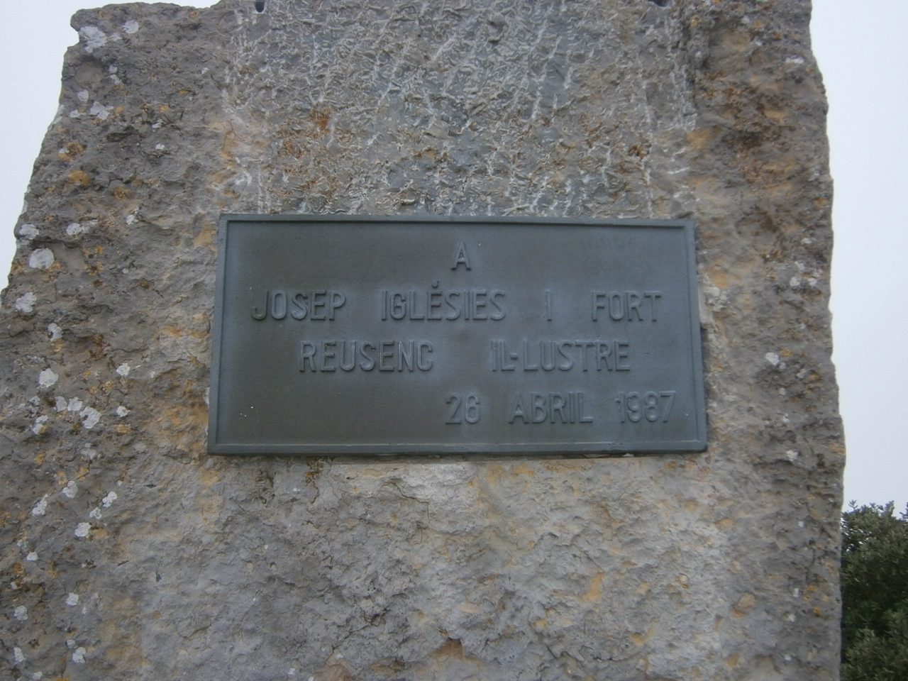 Placa a Josep Iglésies i Fort, reusenc il·lustre, al poble de la Mussara, el 2012